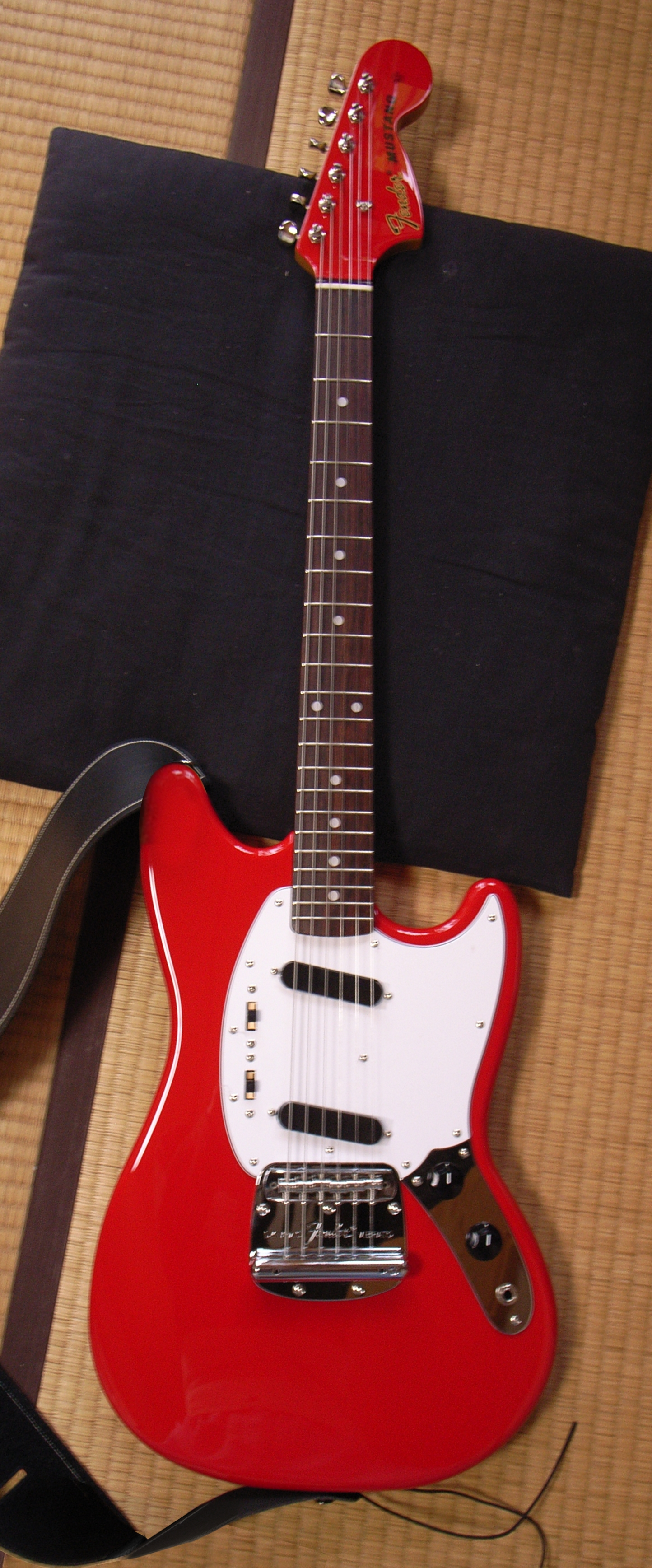 Fender Japan Mustang MG69